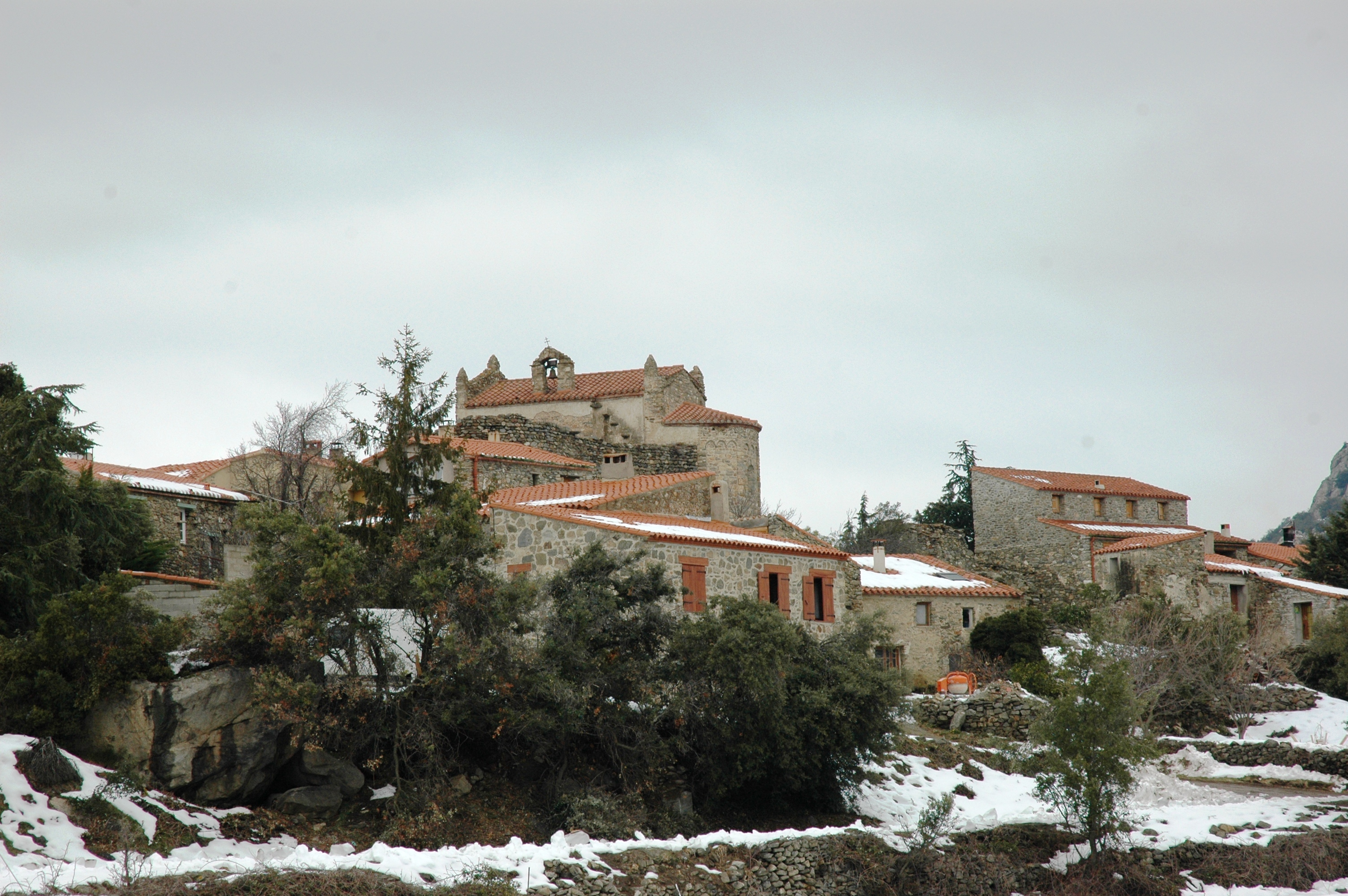 Marcèvol